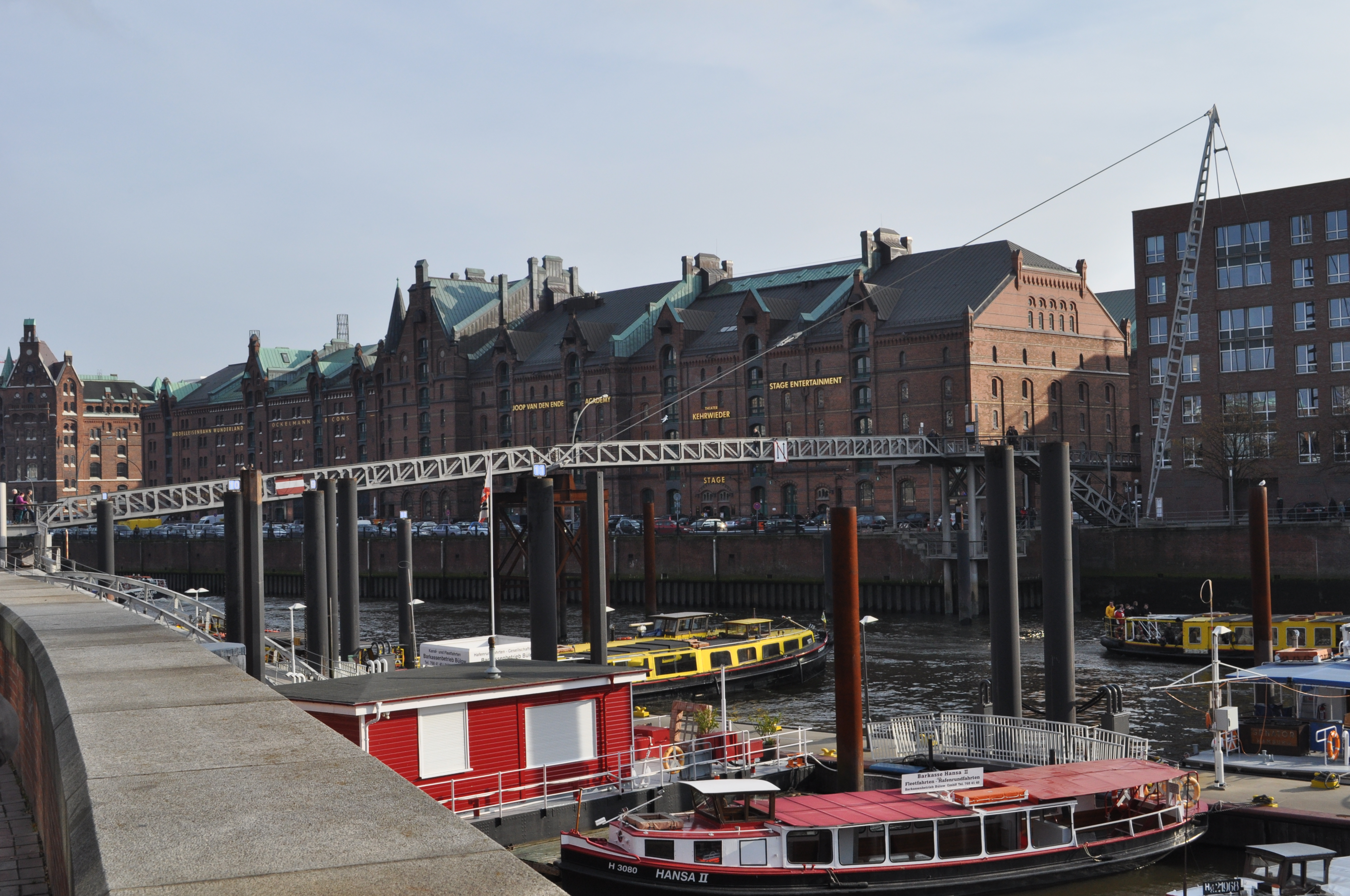 Der Kehrwiedersteg über den Binnenhafen in Hamburg.